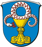 Wappen von Elz (Lahn)